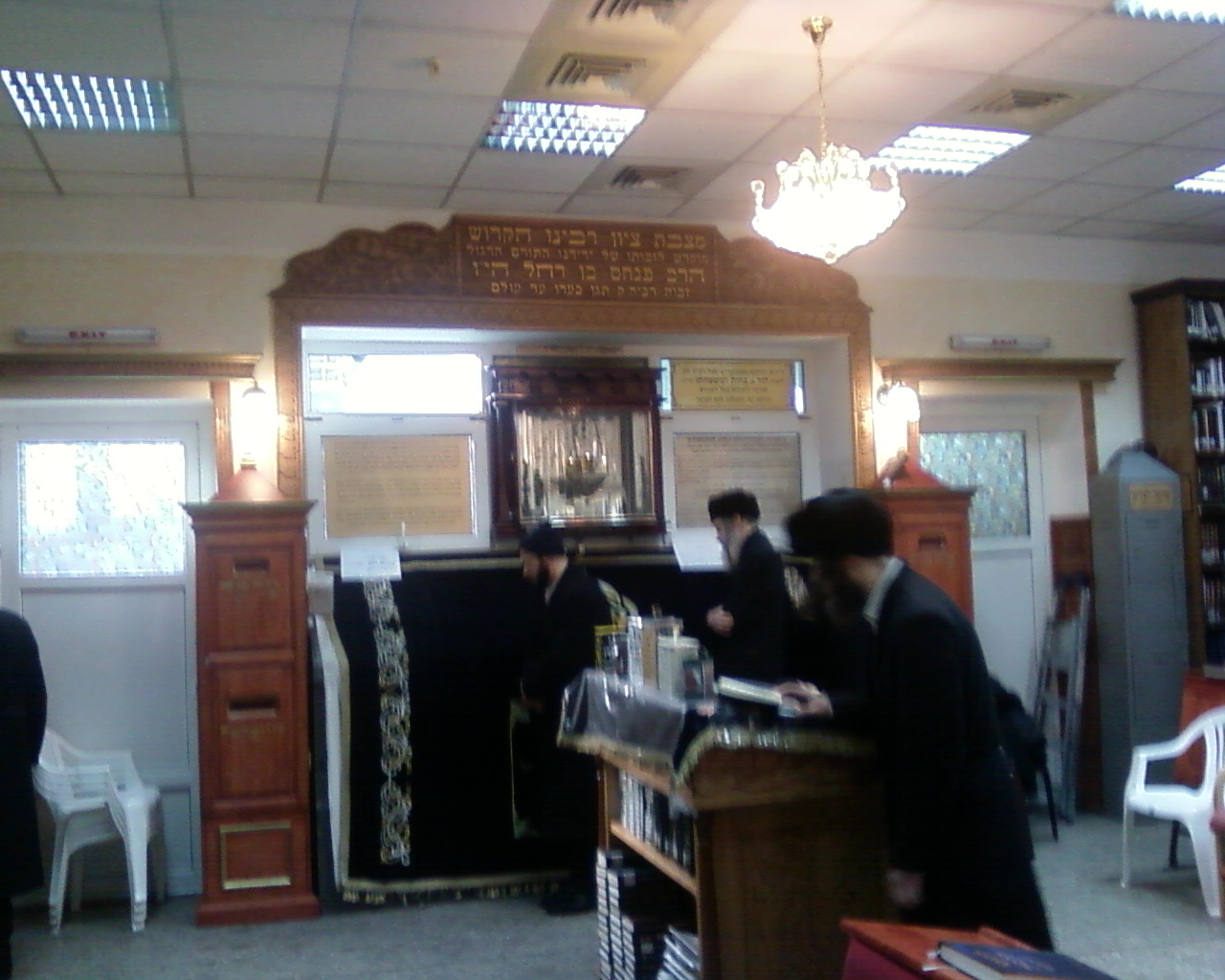 ציון רבינו הקדוש , רבי נחמן מברסלב בעיר אומן